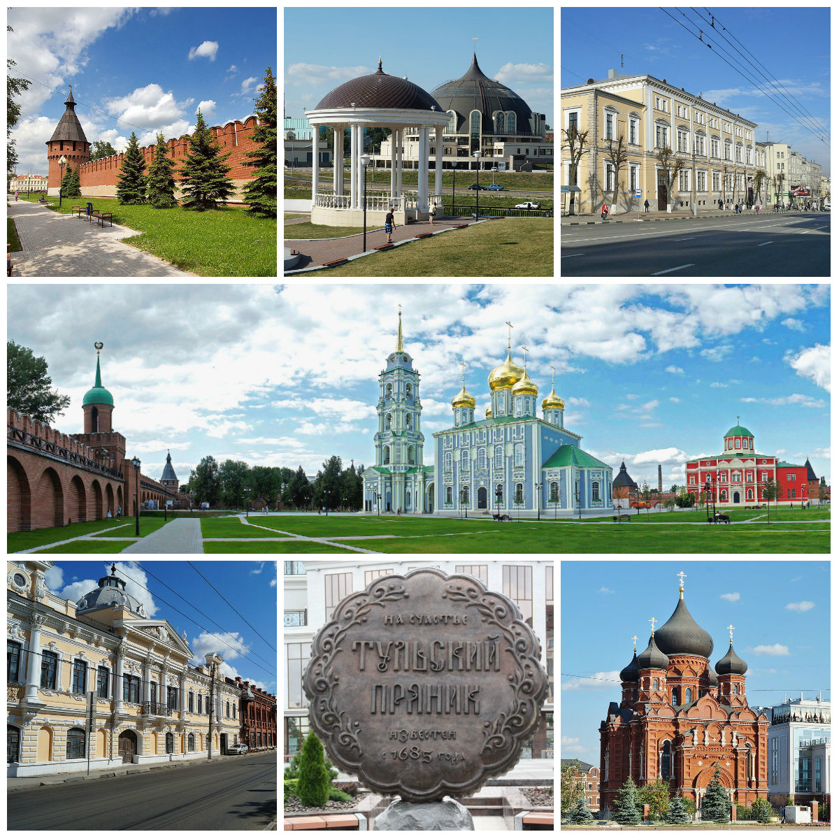 collage